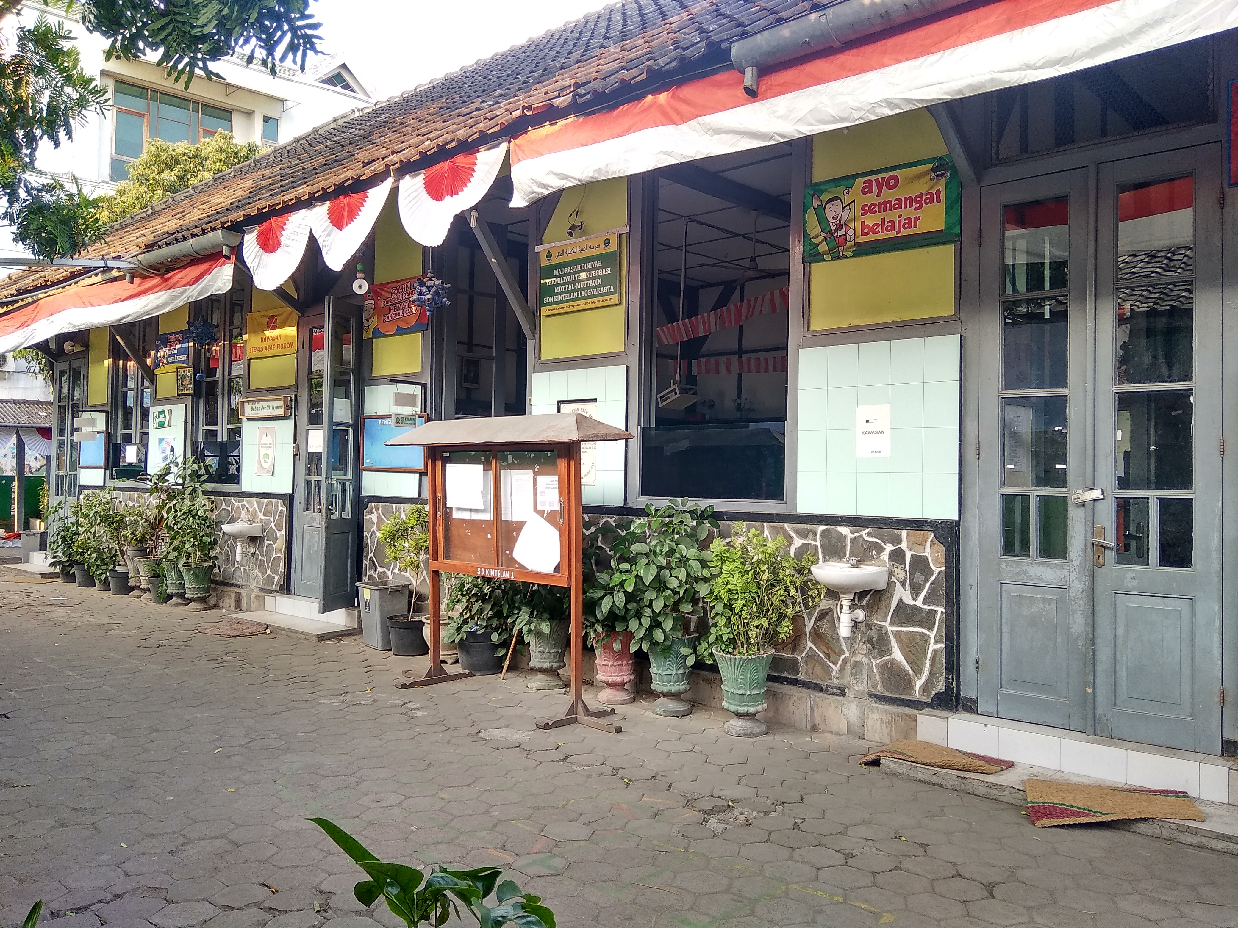 Sekolah Dasar Negeri Kintelan I adalah salah satu bangunan cagar budaya yang terletak di Jalan Brigjend Katamso No. 163, Kelurahan Keparakan, Kecamatan Mergangsan, Kota Yogyakarta, Provinsi Daerah Istimewa Yogyakarta. Sekolah tersebut didirikan tanggal 1 Juni 1897 dengan nama Gouvernment Native School. Bangunan sekolah ini lantas digunakan sebagai SR (Sekolah Rakyat) untuk golongan pribumi dengan nama Tweede Inlandsche School Kintelan atau Sekolah Ongko Loro Kintelan.